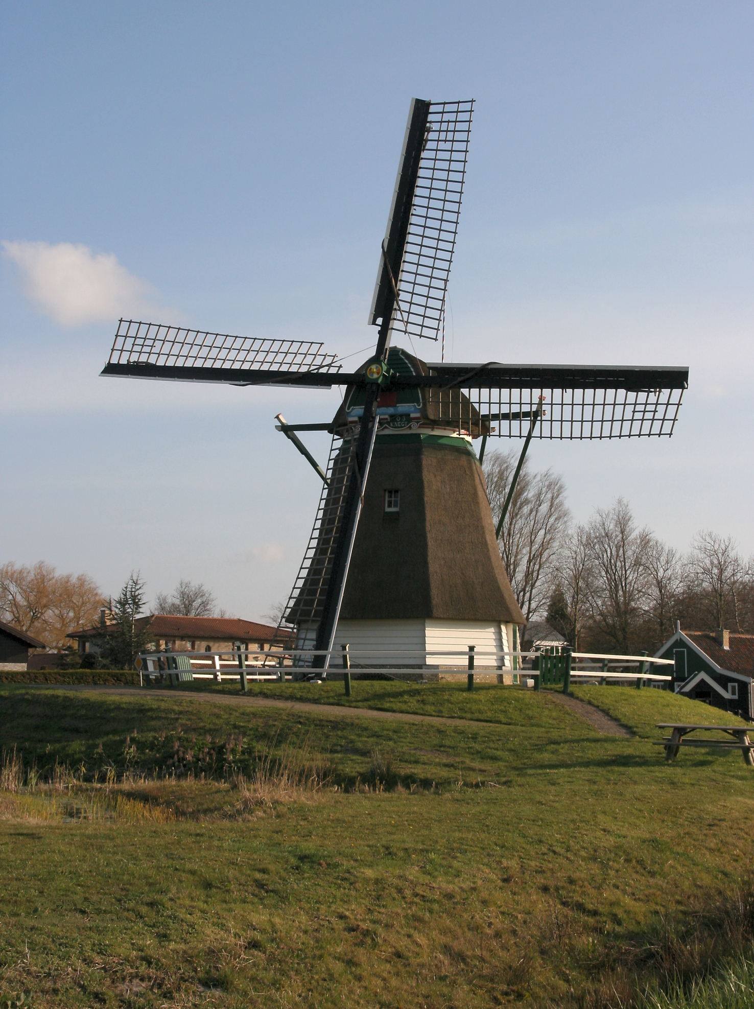 Akersloot: molen De Oude Knegt (III)